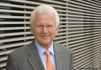 Prof. Jobst Plog. © NDR/André Heeger